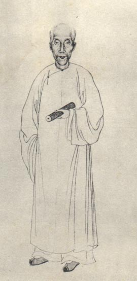 丁晏，清代學者。Ding Yan